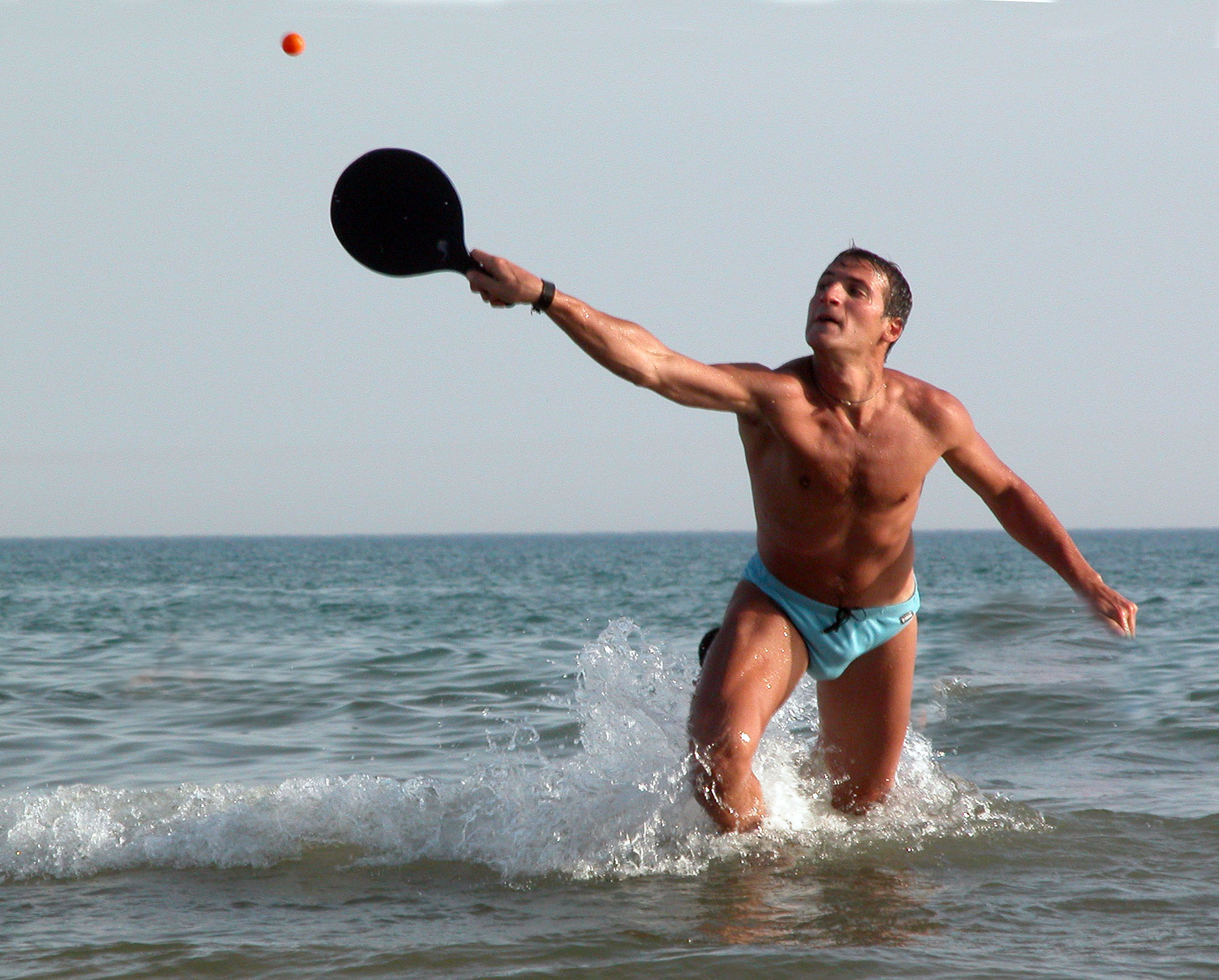 Visto che non è inverno... ricordo dell'estate. Questa l'ho rubata (l'atleta credo fosse inconsapevole) sulla spiaggia di Marina di Ragusa. Ho ripulito con una certa cura i numerosi bagnanti che affollavano la scena e turbavano il gesto atletico. La pallina NON è un montaggio. Taken on Marina di Ragusa beach. Only minimal digital cleaning has been performed.